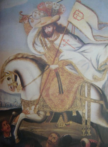 Een oude Zuidamerikaanse afbeelding. 17e eeuw